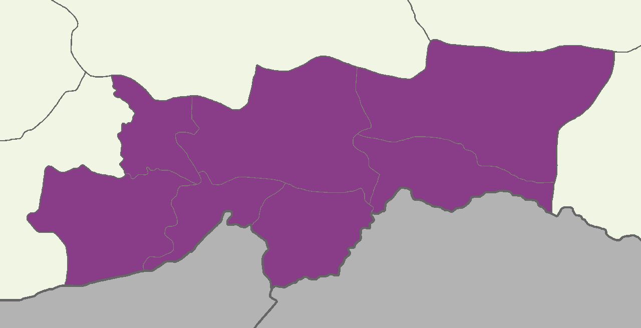 Şırnak'ta 2014 Türkiye cumhurbaşkanlığı seçimi sonuçları